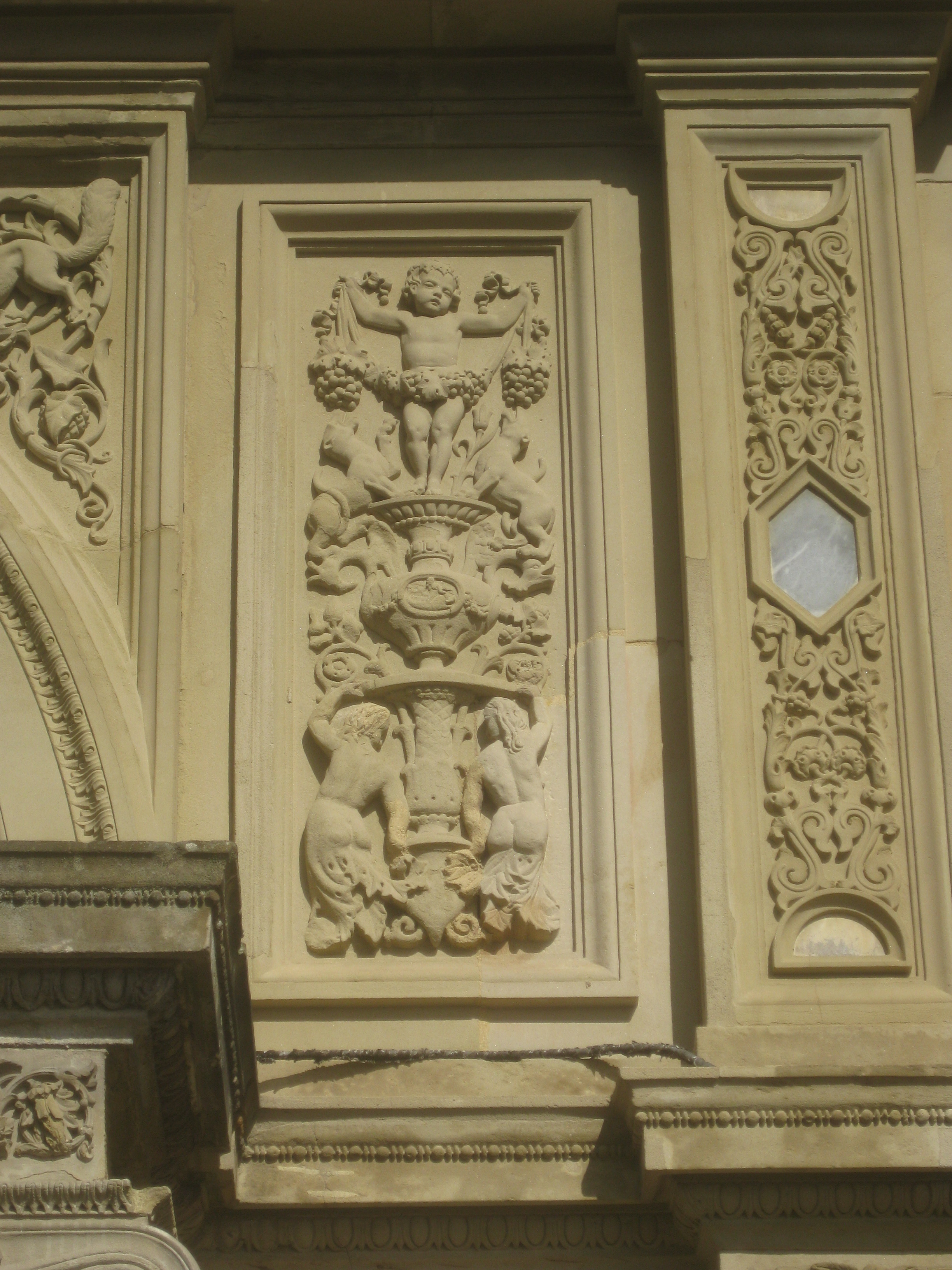 Stuttgart, Villa Berg, Südfassade, Füllung Füllung 2 (Zählung von links nach rechts).